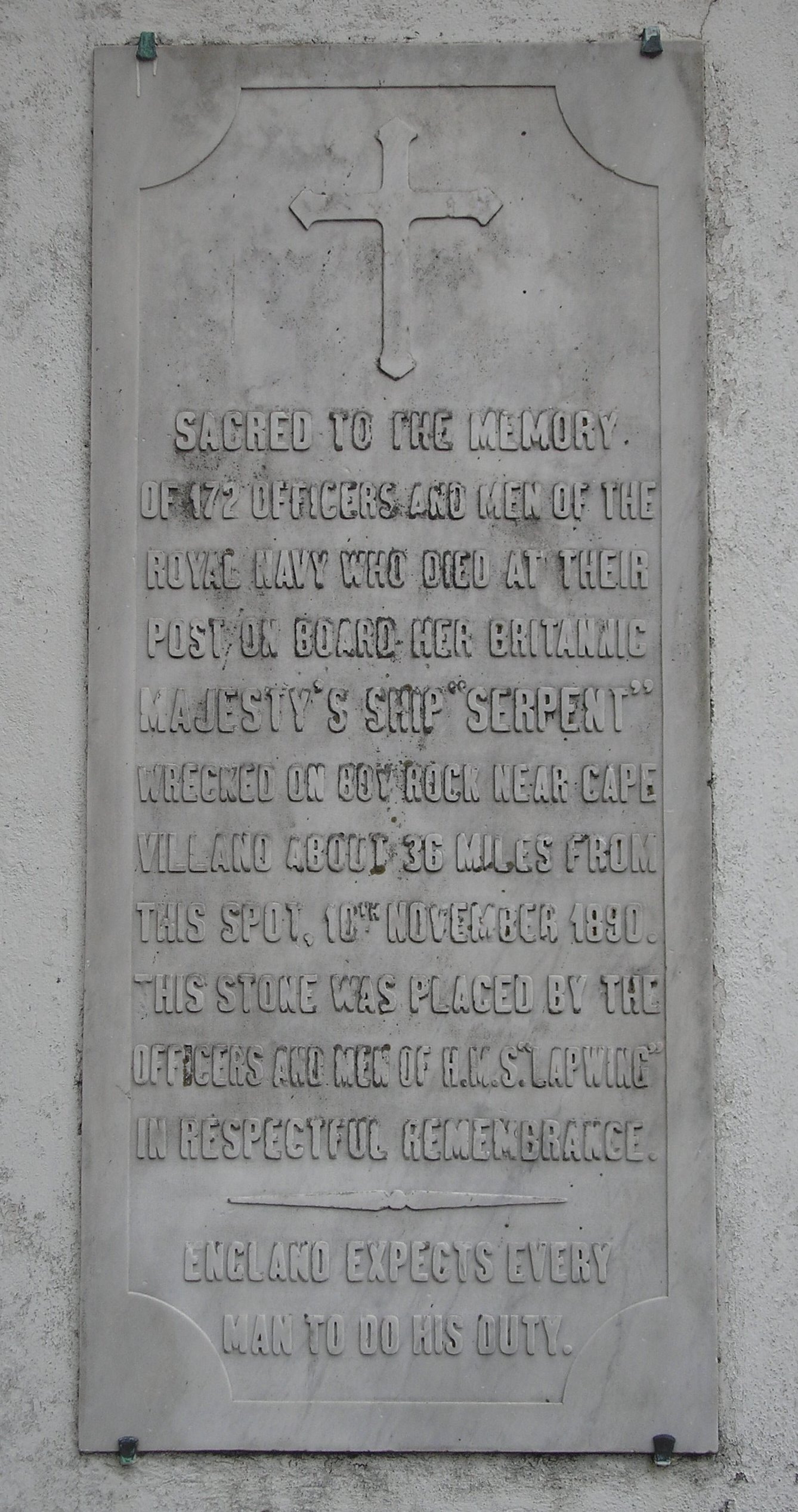 Lápida do Xardín de San Carlos da Coruña en memoria dos ingleses falecidos no naufraxio do buque Serpent